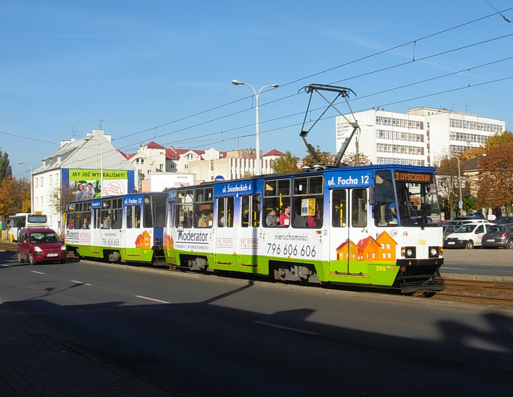 Tramwaj na ulicy Jagiellońskiej w Bydgoszczy